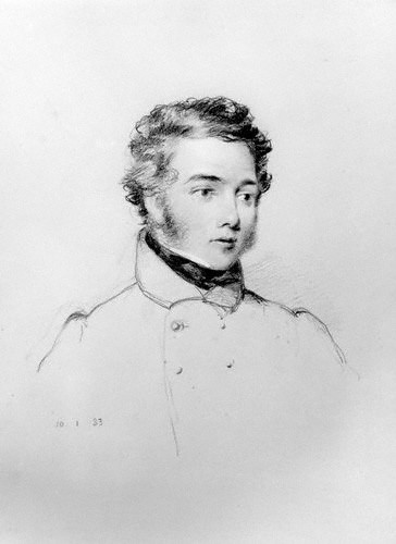 Sir George Back